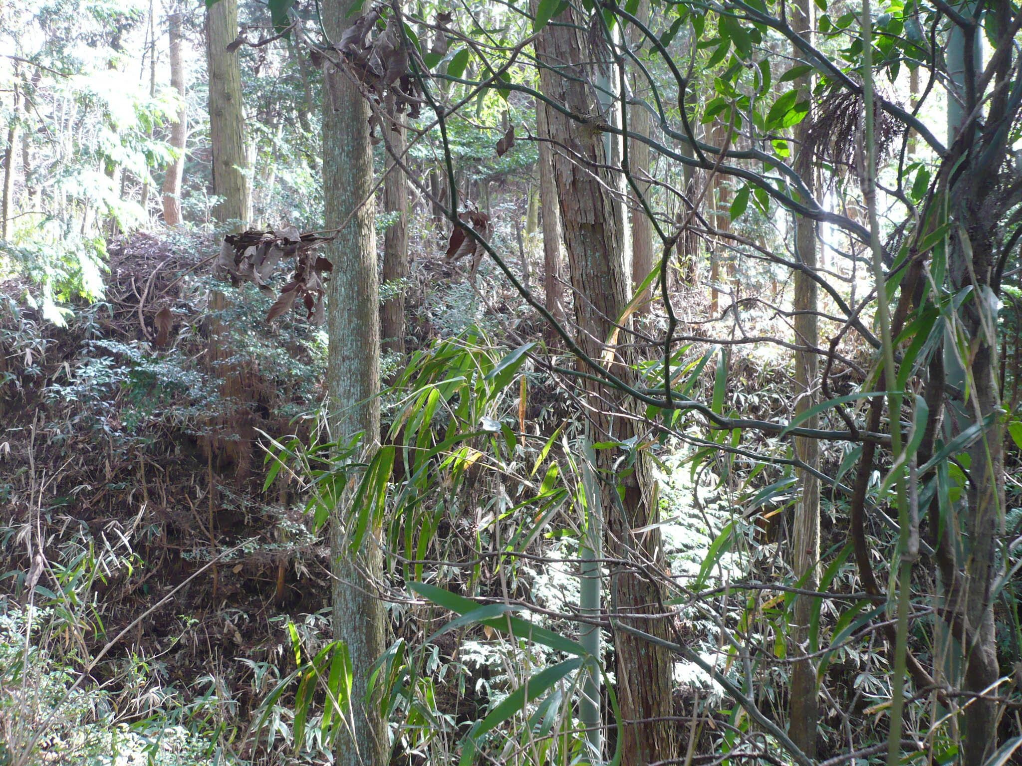 主郭南西にある張出し